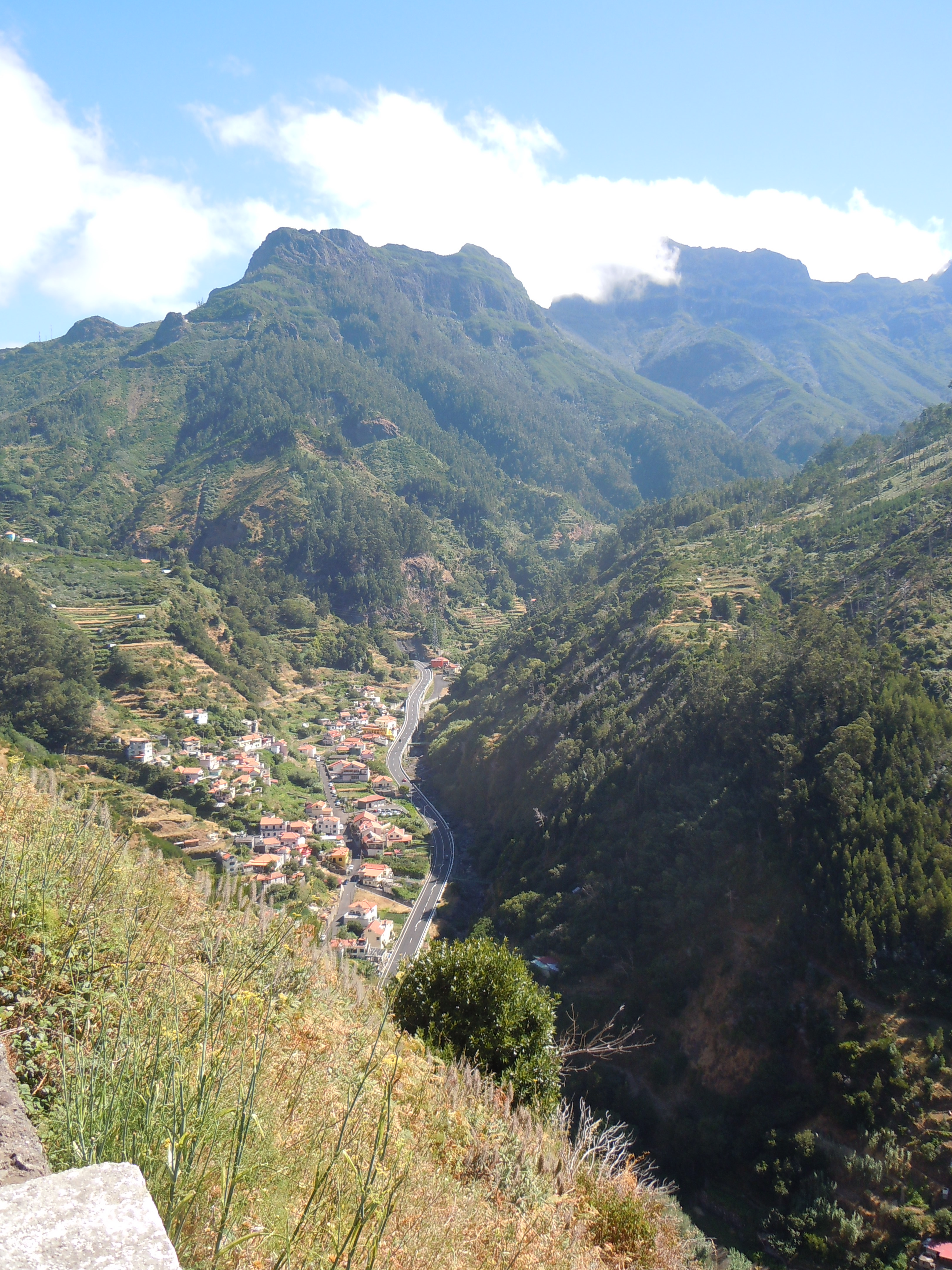 Vue de Serra de Serra de Água depuis la ER-110